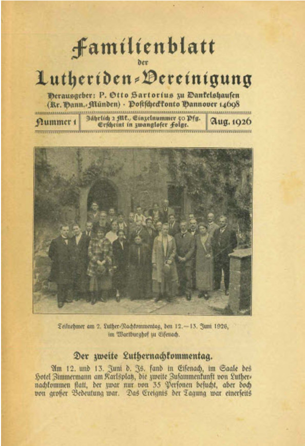 Titelblatt der Erstausgabe des Familienblattes mit Teilnehmern der Vereinigung auf einem Familientreffen.